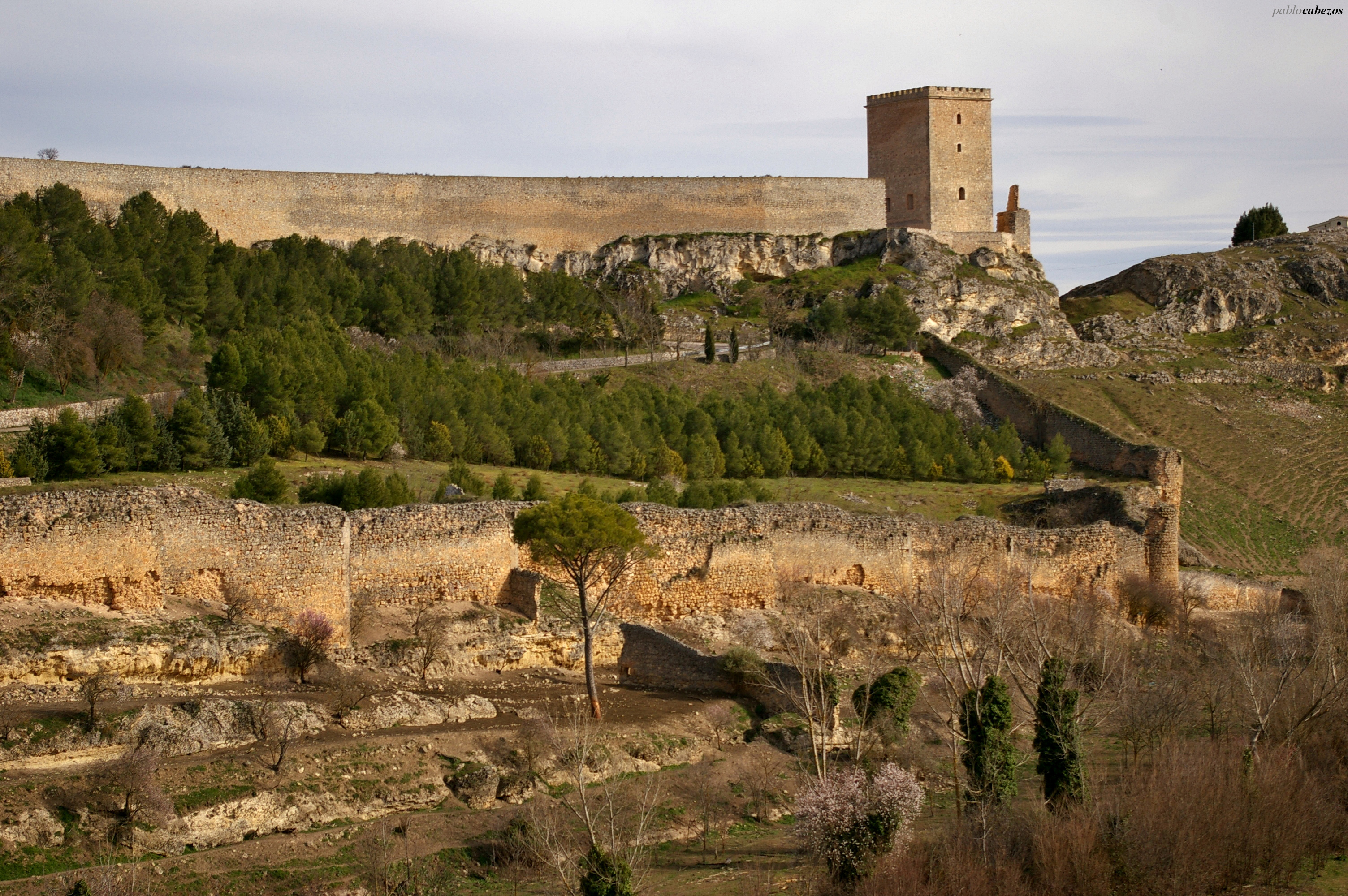 Restos del castillo de Uclés (provincia de Cuenca, España)